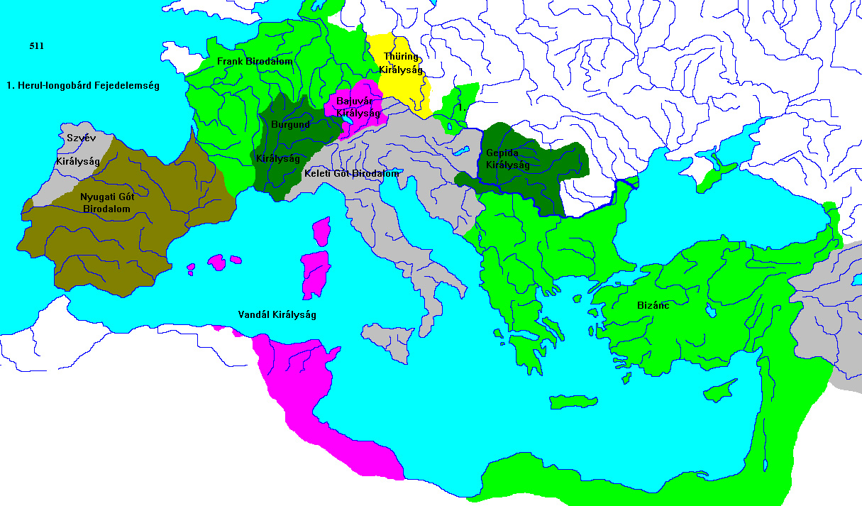 Európa térképe 511-ben